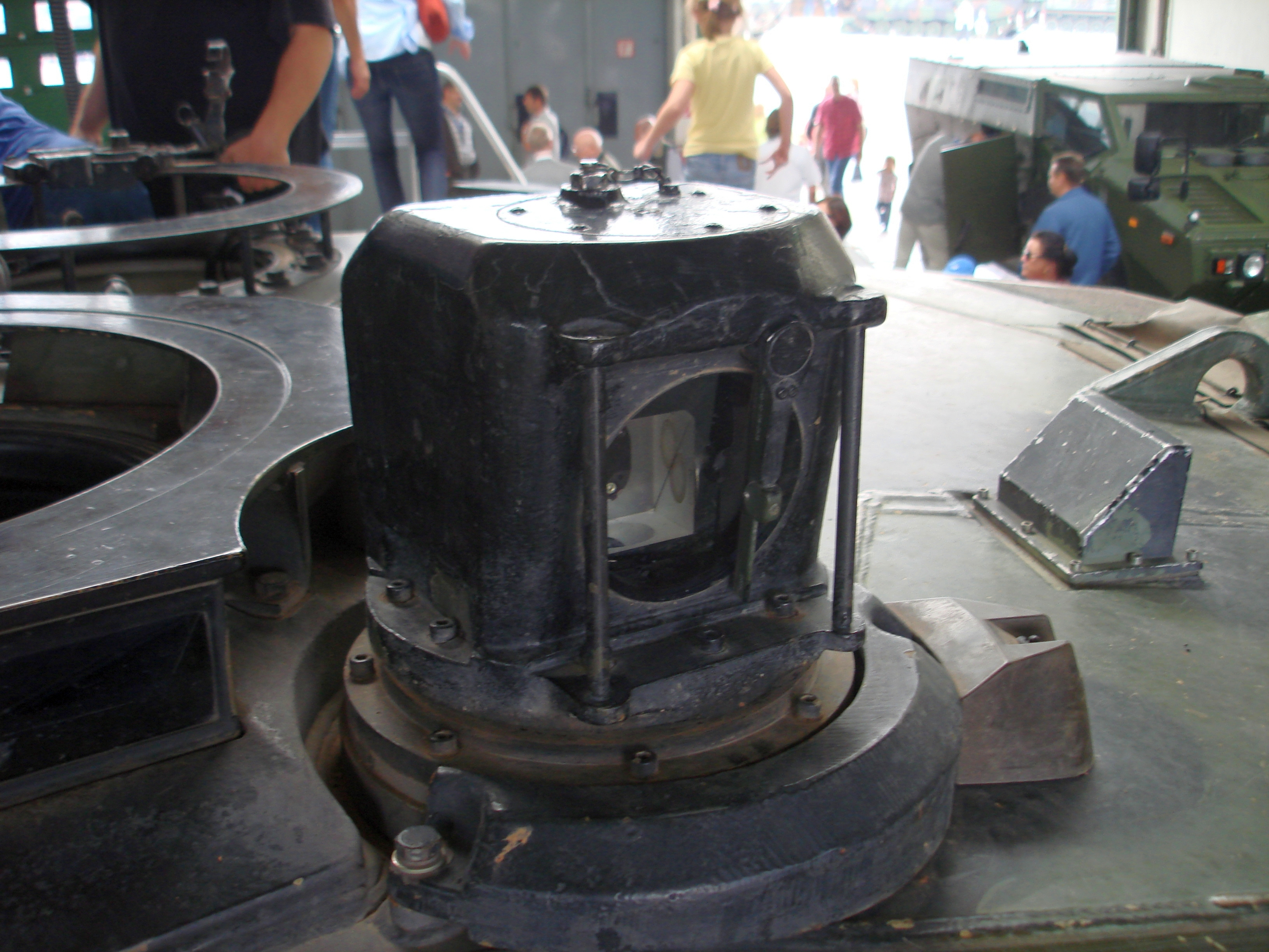 Periskop R17 des Leopard_2A4. Es dient dem Kommandanten als eigenes Beobachtungs-, Ziel- und Entfernungsmessgerät.